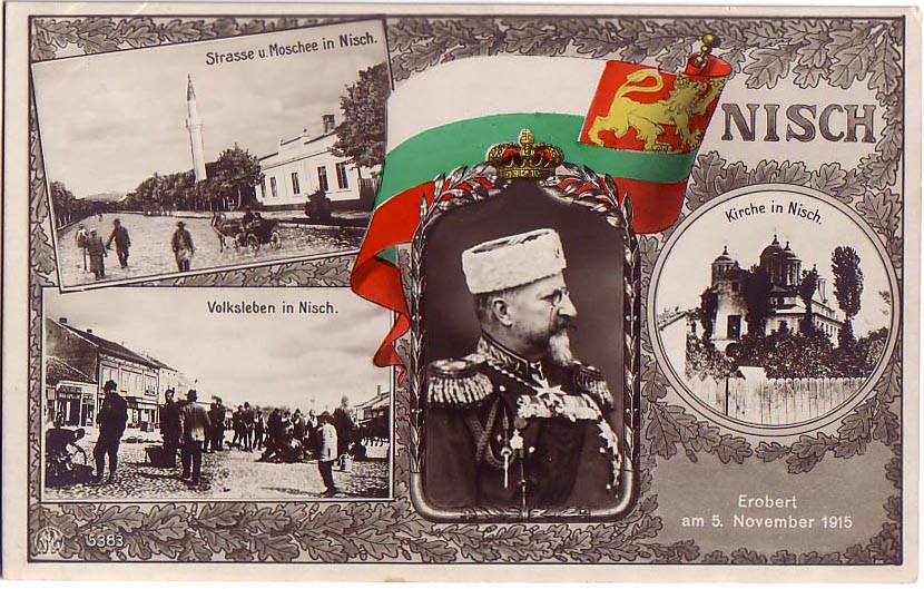 Българска пропагандна картичка за превземнето на Ниш, 5 октомври 1915 г.